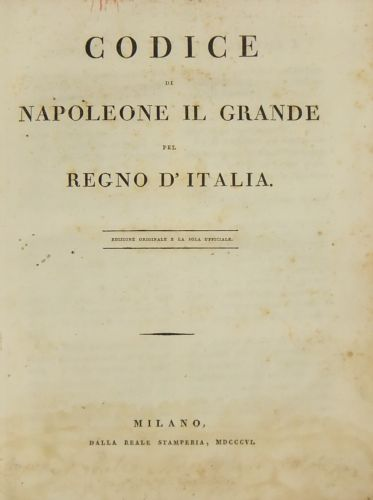 Codice di Napoleone il Grande pel Regno d'Italia, edizione originale e la sola ufficiale, Milano, dalla Stamperia Reale MDCCCVI (1806)